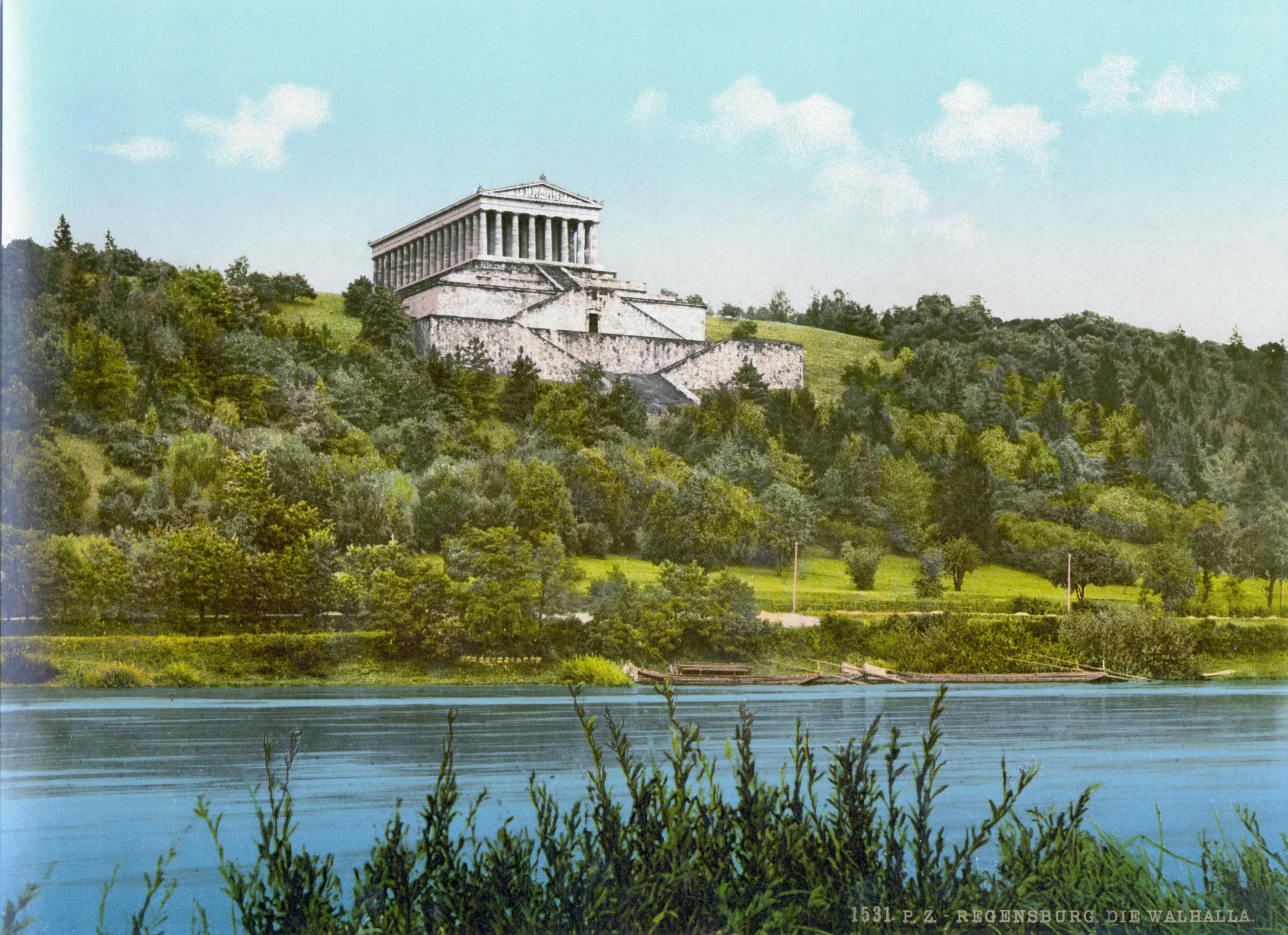 Walhalla, Donau, Regensburg